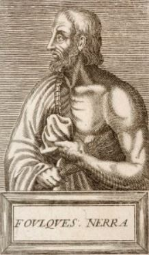 Foulques de Nerra en buste